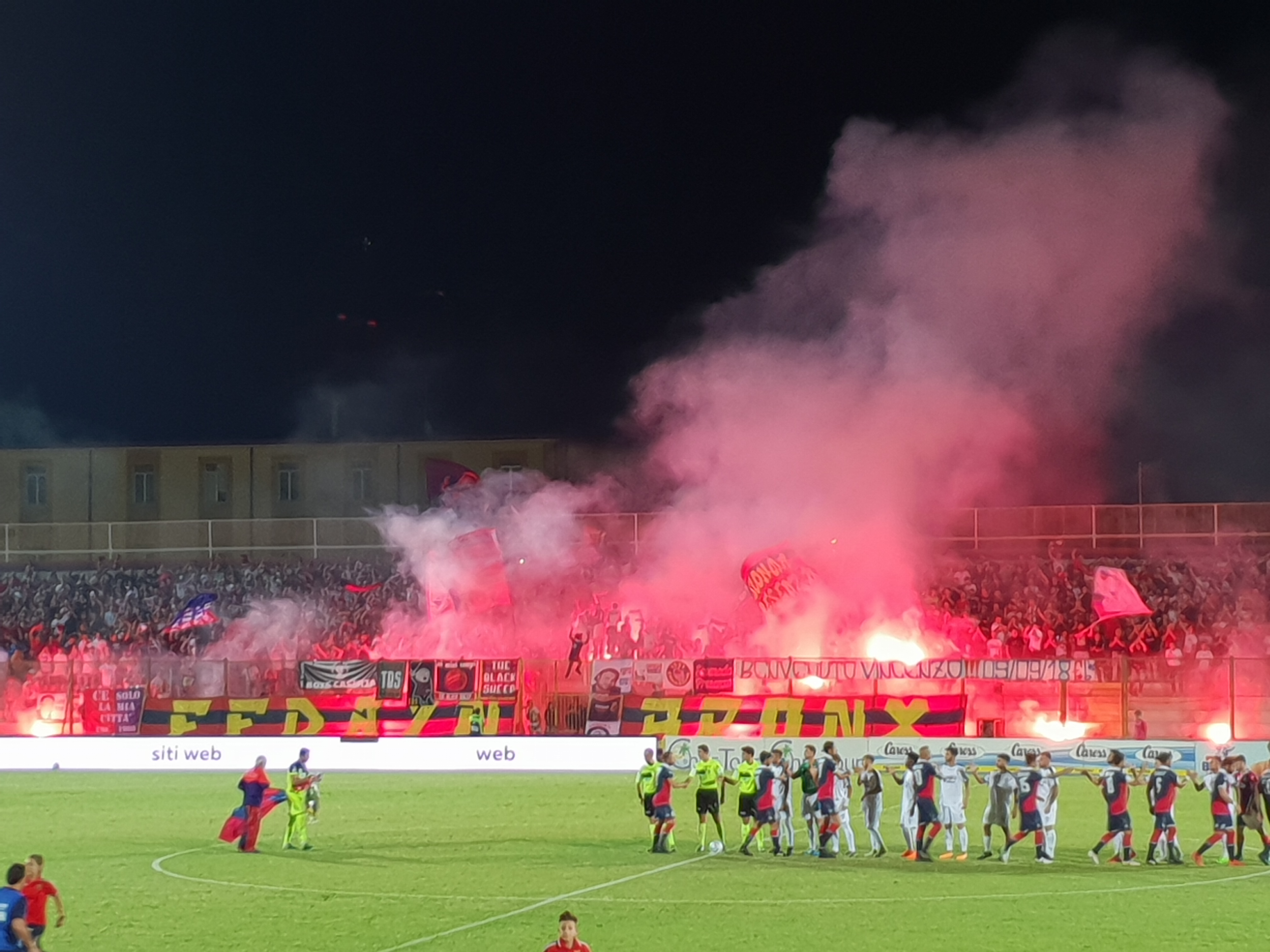 Ultras della Casertana in Casertana-Cavese 3-1 del 2018-19 prima del fischio d'inizio